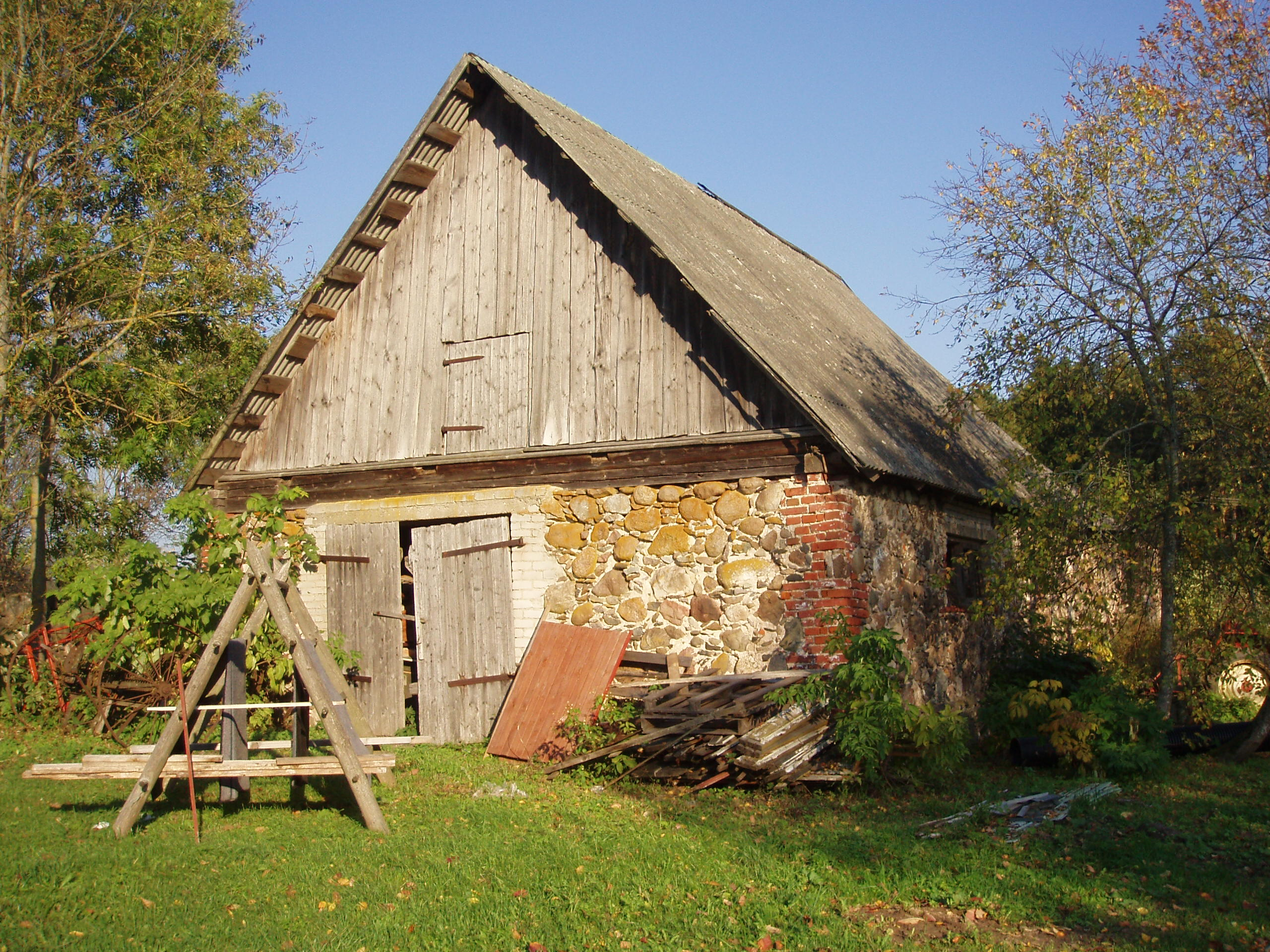 Maramaa mõisa kõrvalhoone 2007. aastal